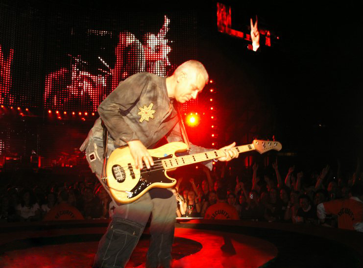 Bildbeschreibung: U2-Konzert am 2. Juli 2005 in Wien Quelle: Fotograf: Tobias Schleser (selbst fotografiert) Datum: 02.07.2005